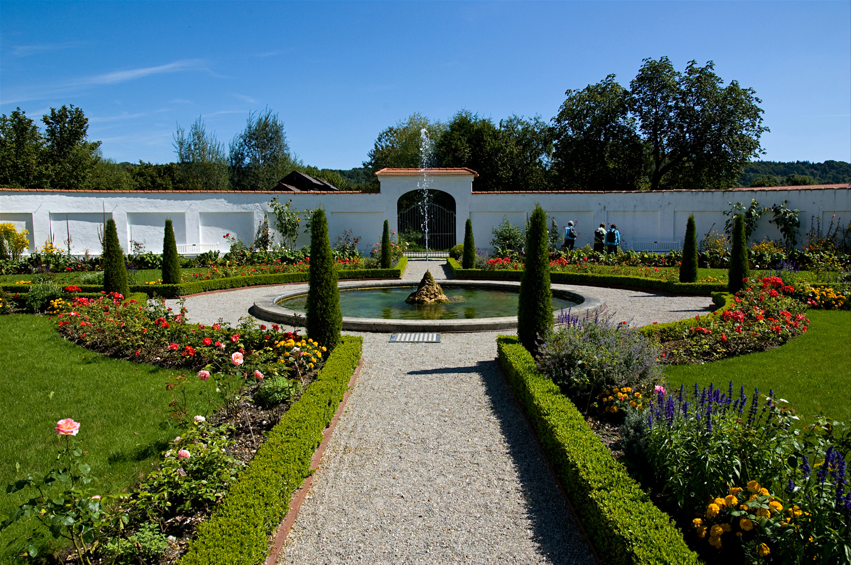 Kloster_Schäftlarn: Prälatengarten (2009)